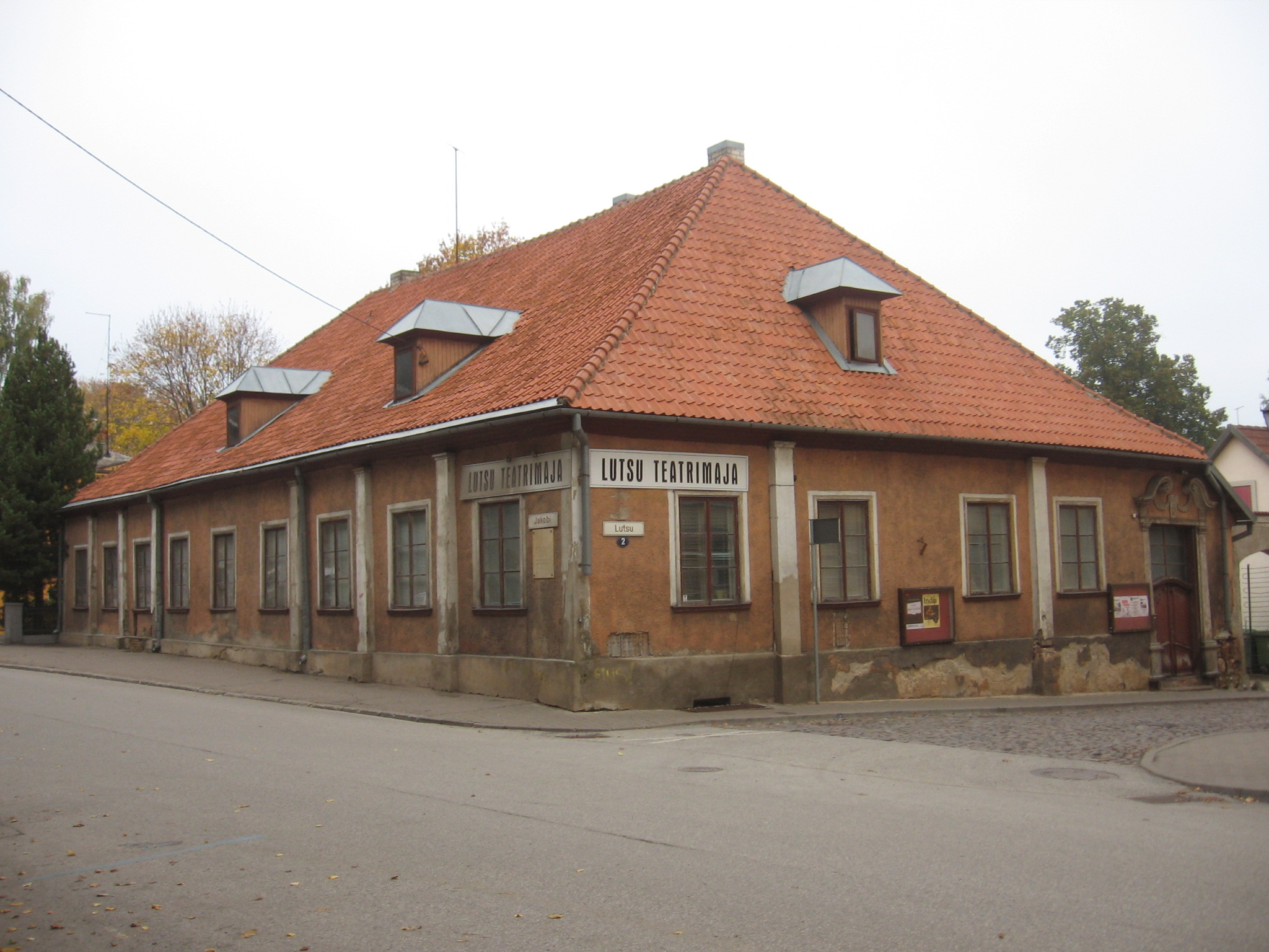 Elamu Tartus Lutsu 2